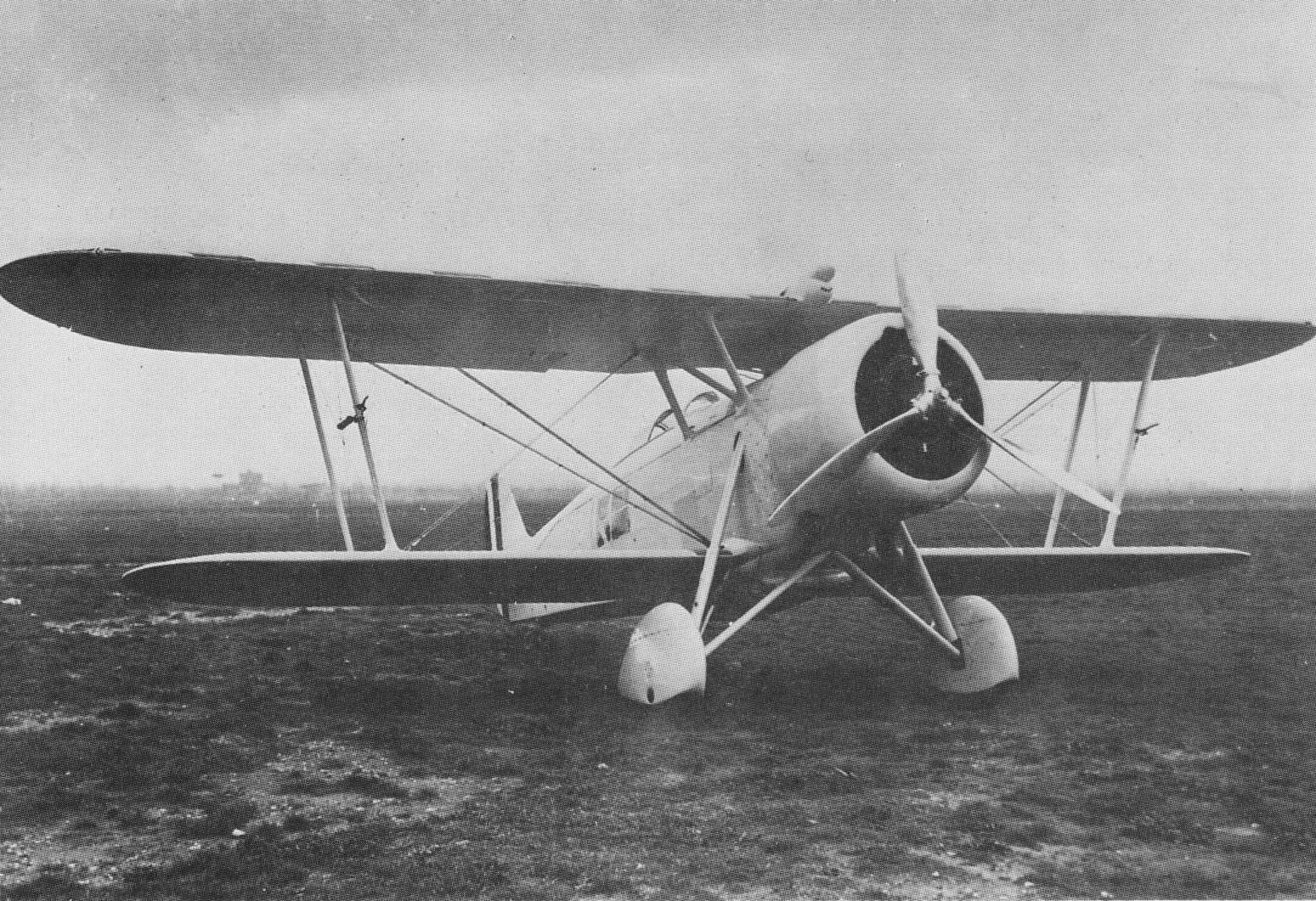 IMAM Ro.37bis, aereo da ricognizione monomotore biplano, data e luogo della scatto imprecisati.